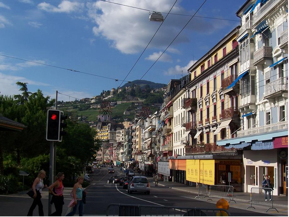 Vue du centre-ville de Montreux.